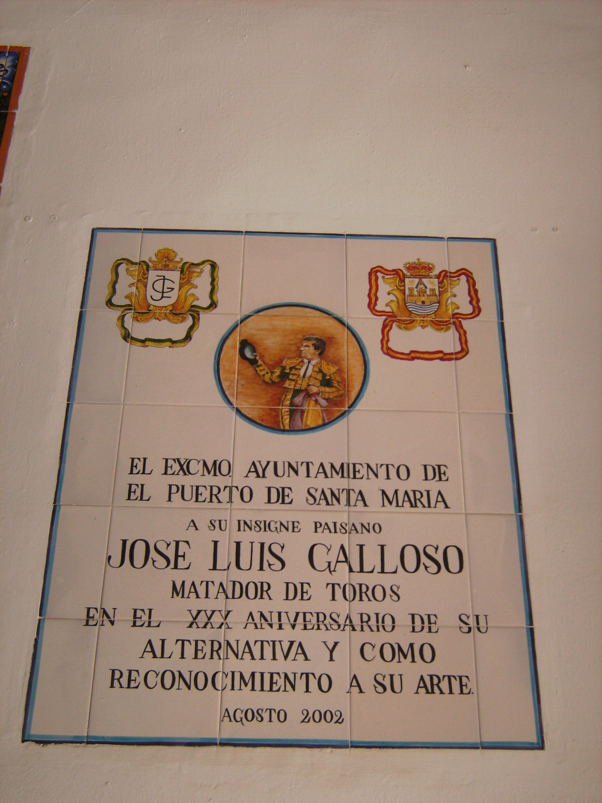 Azulejos en el interior de la Plaza de toros de El Puerto de Santa María dedicados al diestro portuense José Luis Galloso.